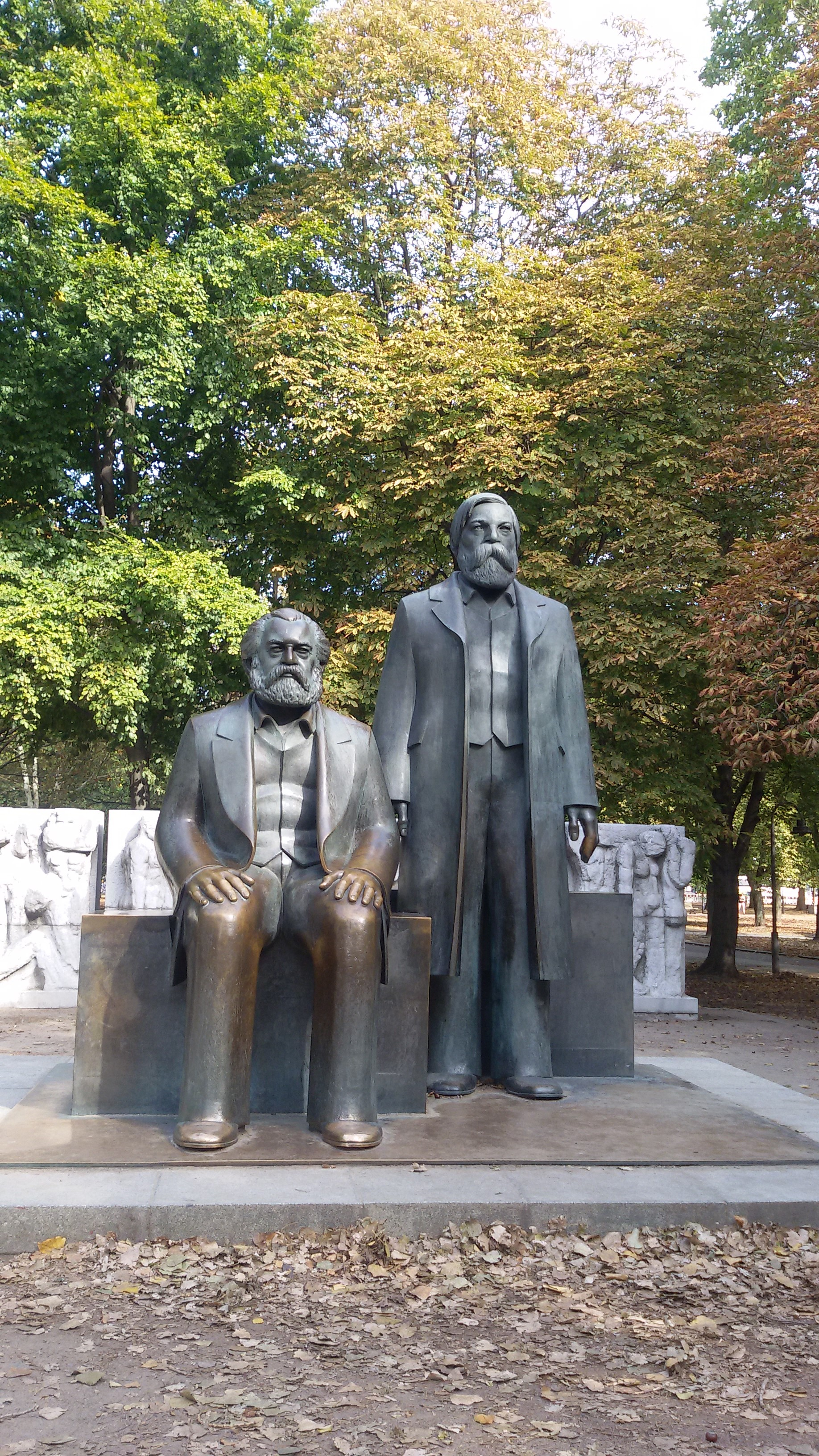 മാർക്സ്-എംഗൽസ് സ്മാരകം